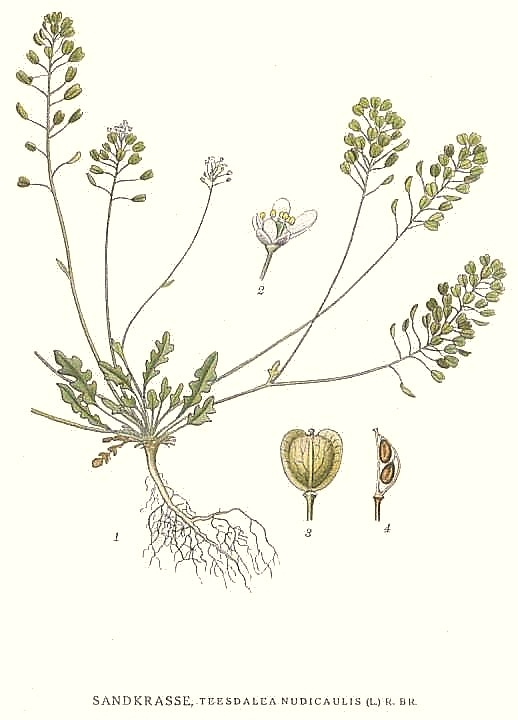 Original Description Sandkrasse, Teesdalia nudicaulis (L.) R. Br.